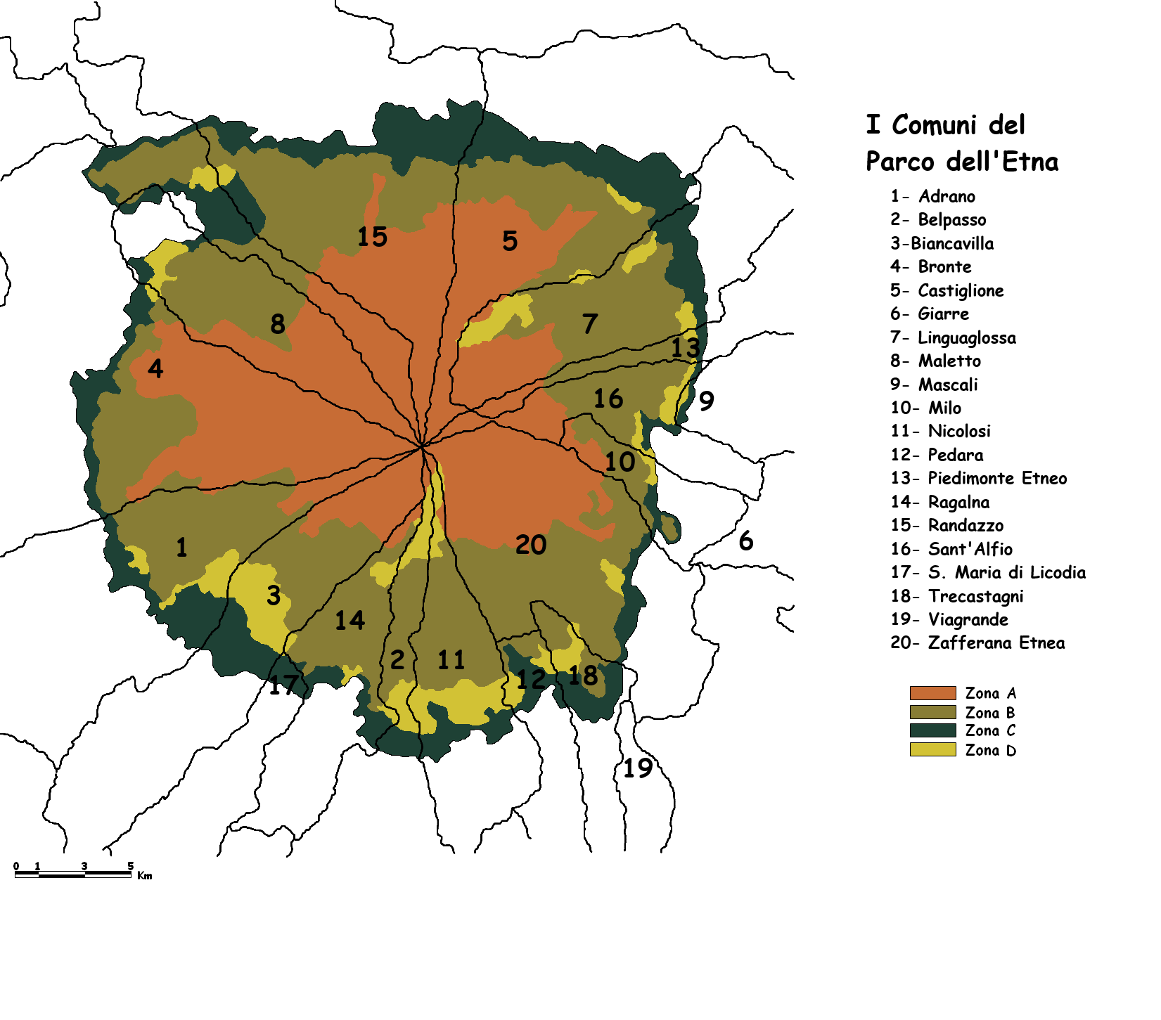 Mappa del Parco dell'Etna con la sovrapposizione dei territori comunali in cui ricade.